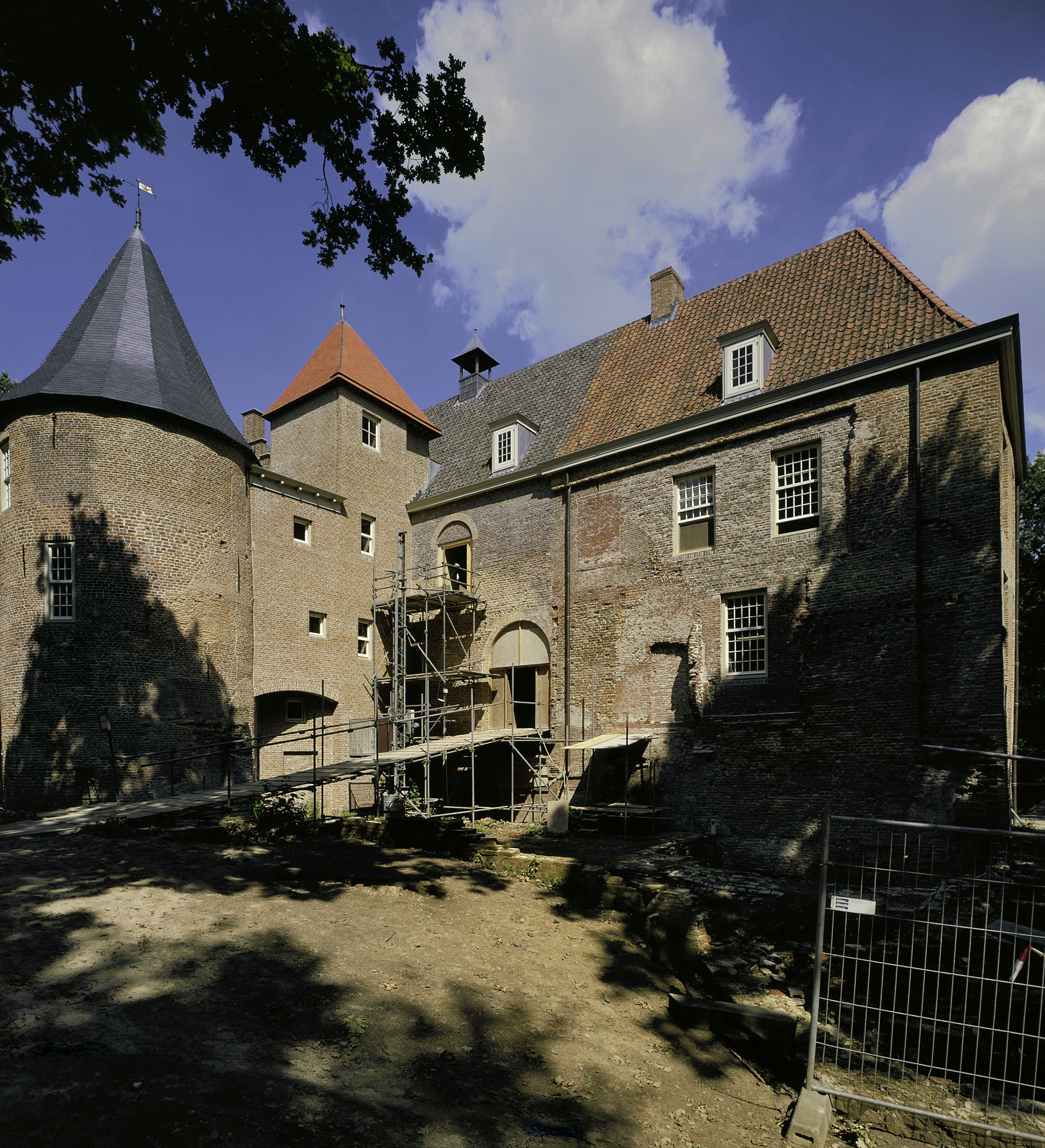 Kasteel Nederhemert: Overzicht ronde toren, traptoren en westmuur van de hoofdvleugel (opmerking: Boek: "66 Kanjermonumenten")